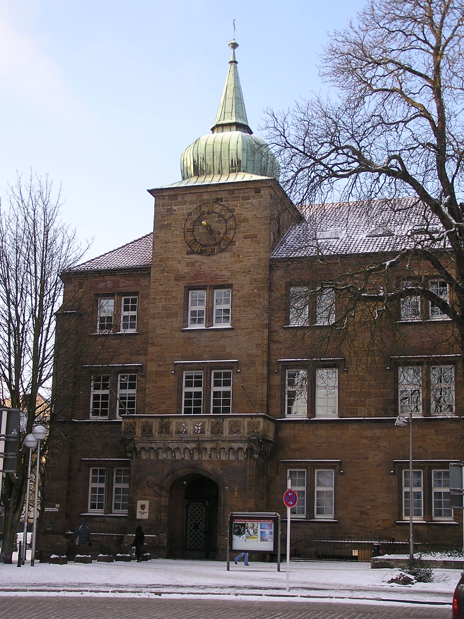 Alte Regierung in Minden, Kreis Minden-Lübbecke, Nordrhein-Westfalen.